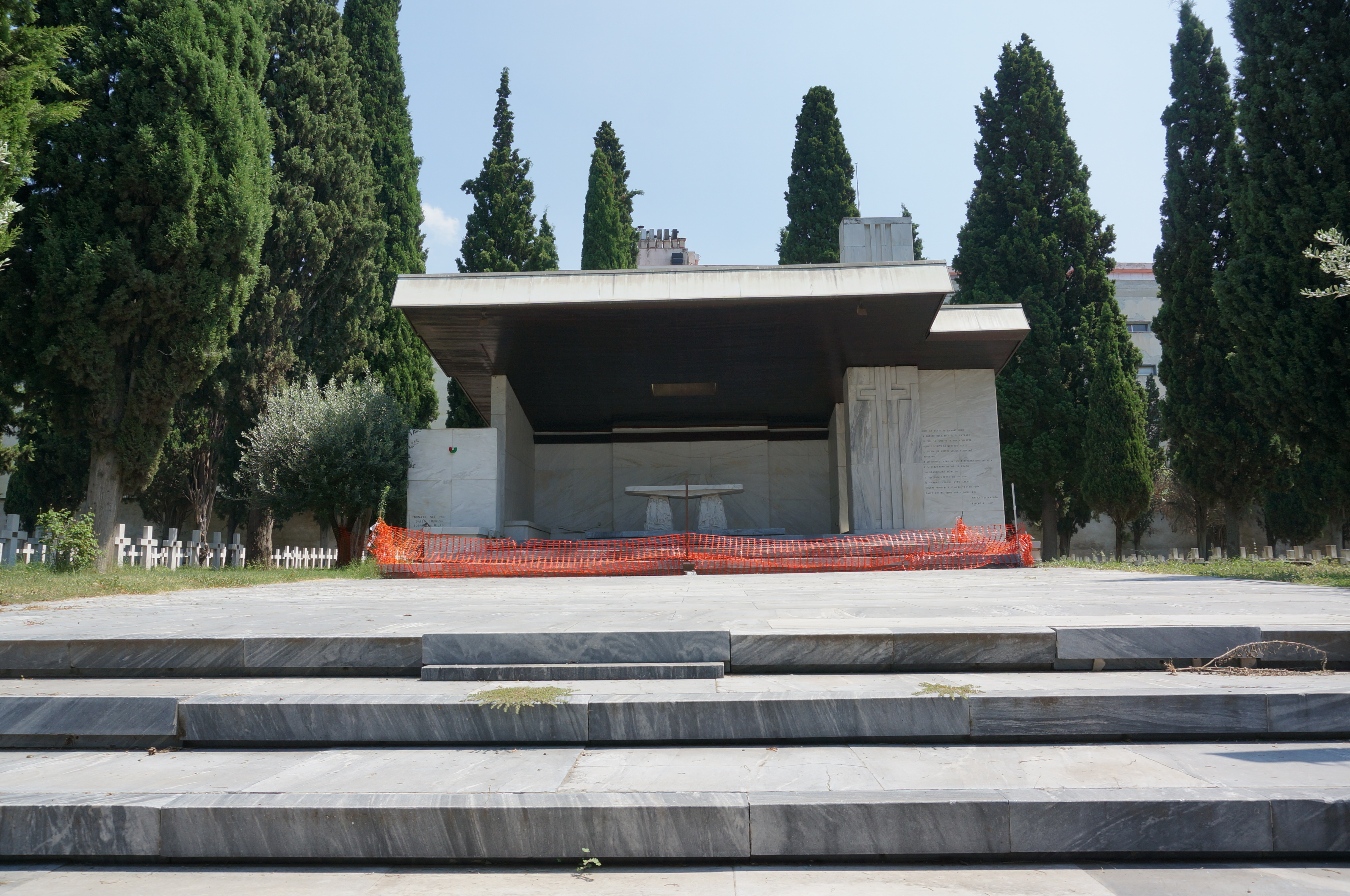 Dans le parc Memorial de Zeitenlik à Thessaloniki.